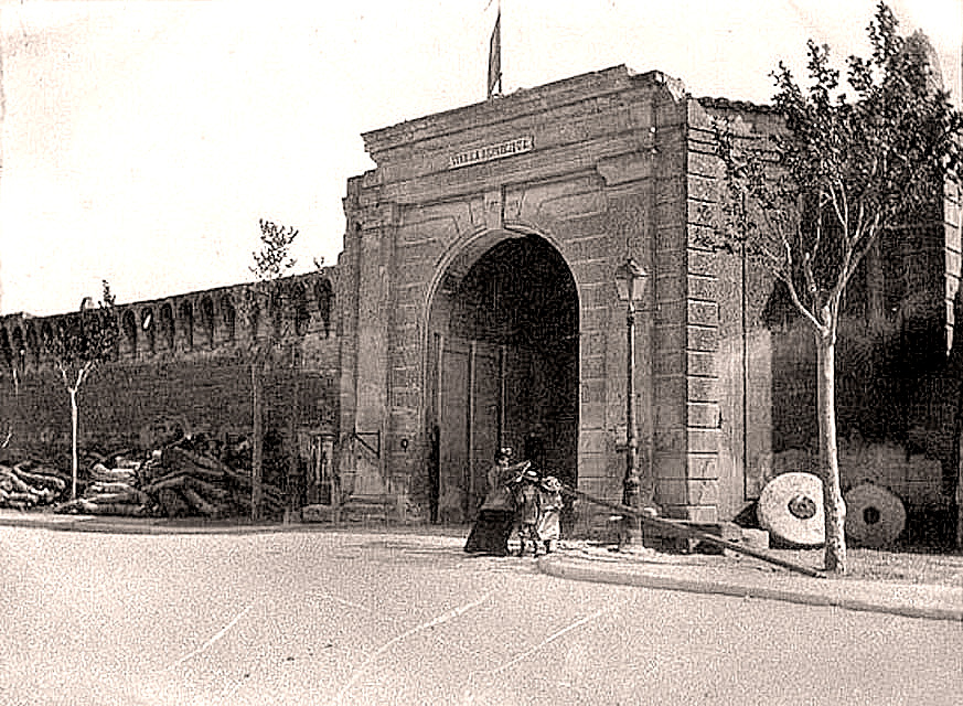 Porte de la Ligne d'Avignon avec des troncs d'arbres flottés le long des remparts